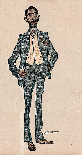 Portada de Santificarás las fiestas.